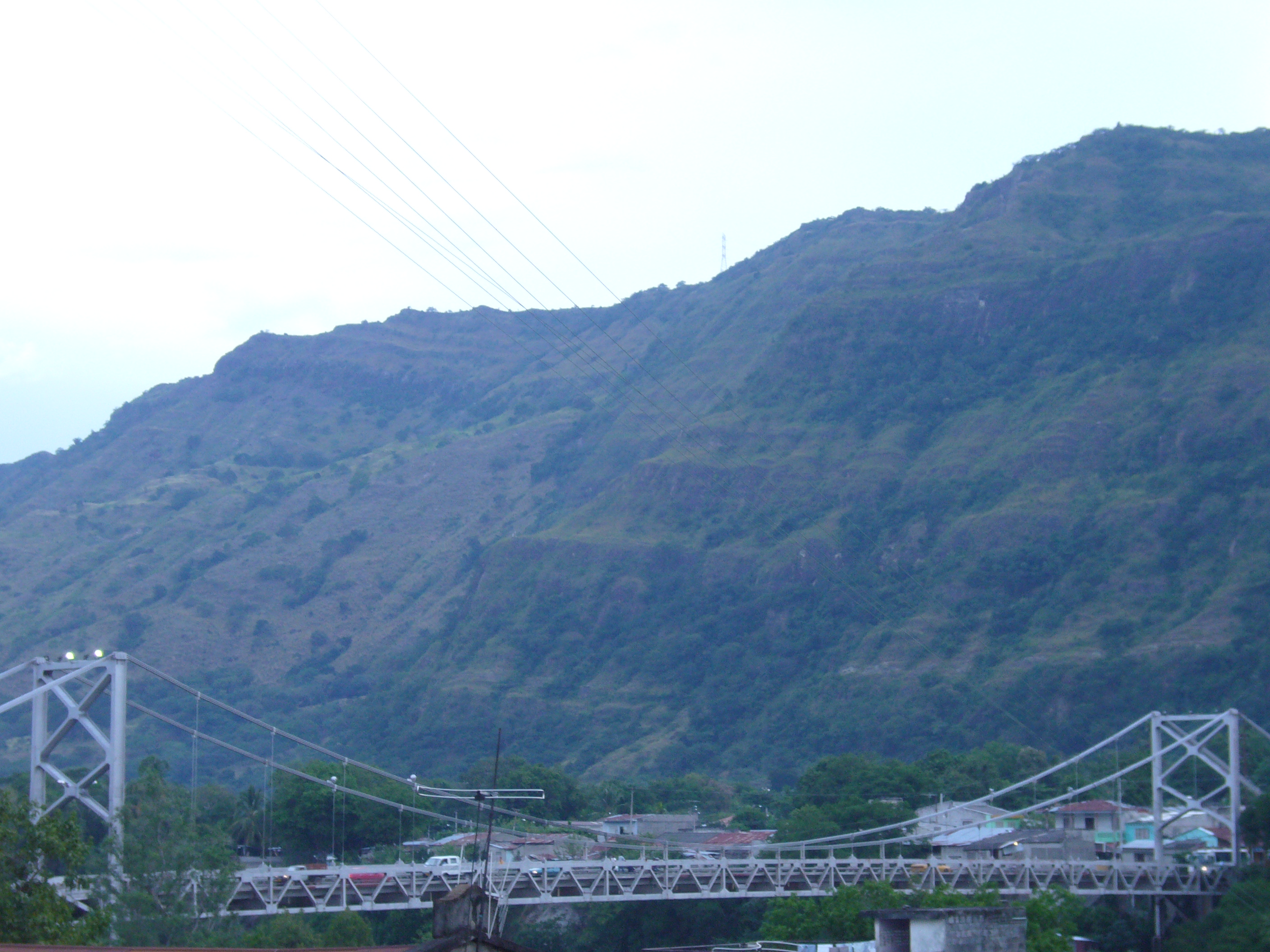 Puente Luis Ignacio Andrade, Honda (Colombia)